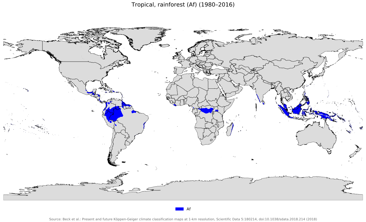 Distribución clima ecuatorial